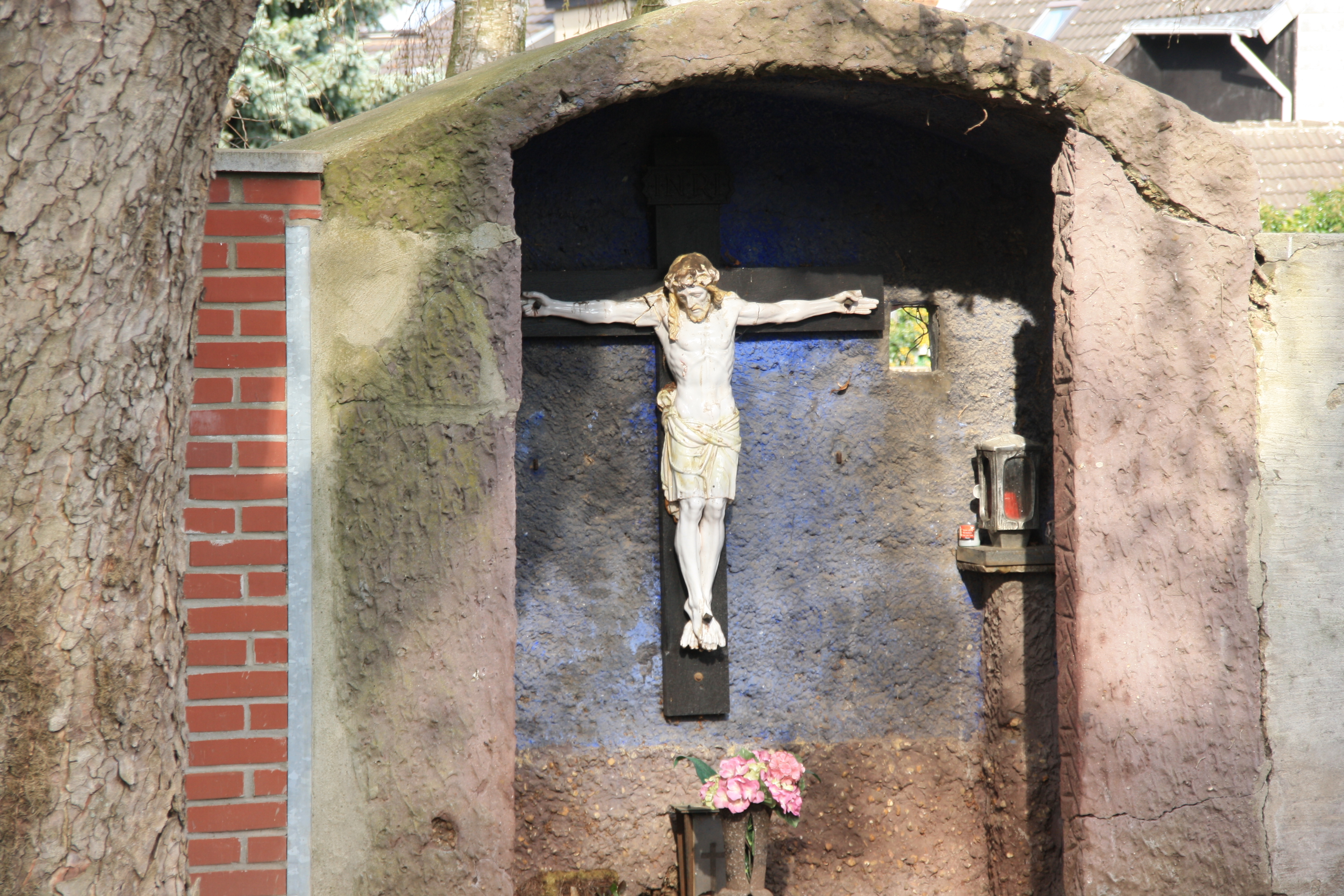 Das Friedhofskreuz auf dem alten Friedhof in Düren-Rölsdorf